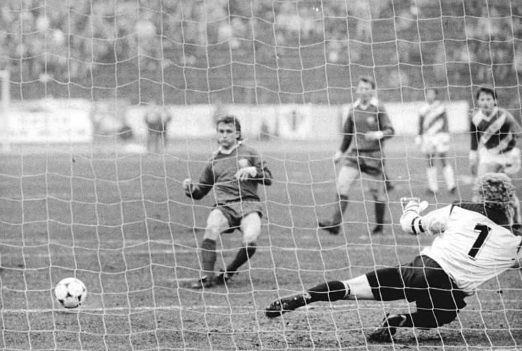 ADN-ZB-Grimm-4.3.89-hko- Berlin: Fußball-Oberliga- BFC Dynamo - Wismut Aue 2:1- Den Führungstreffer erzielte Thomas Doll durch einen an ihm verwirkten Foulstrafstoß, bei dem er dem Wismut-Torhüter Jörg Weißflog keine Chance ließ. Doll war auch der Schütze des zweiten Tores.